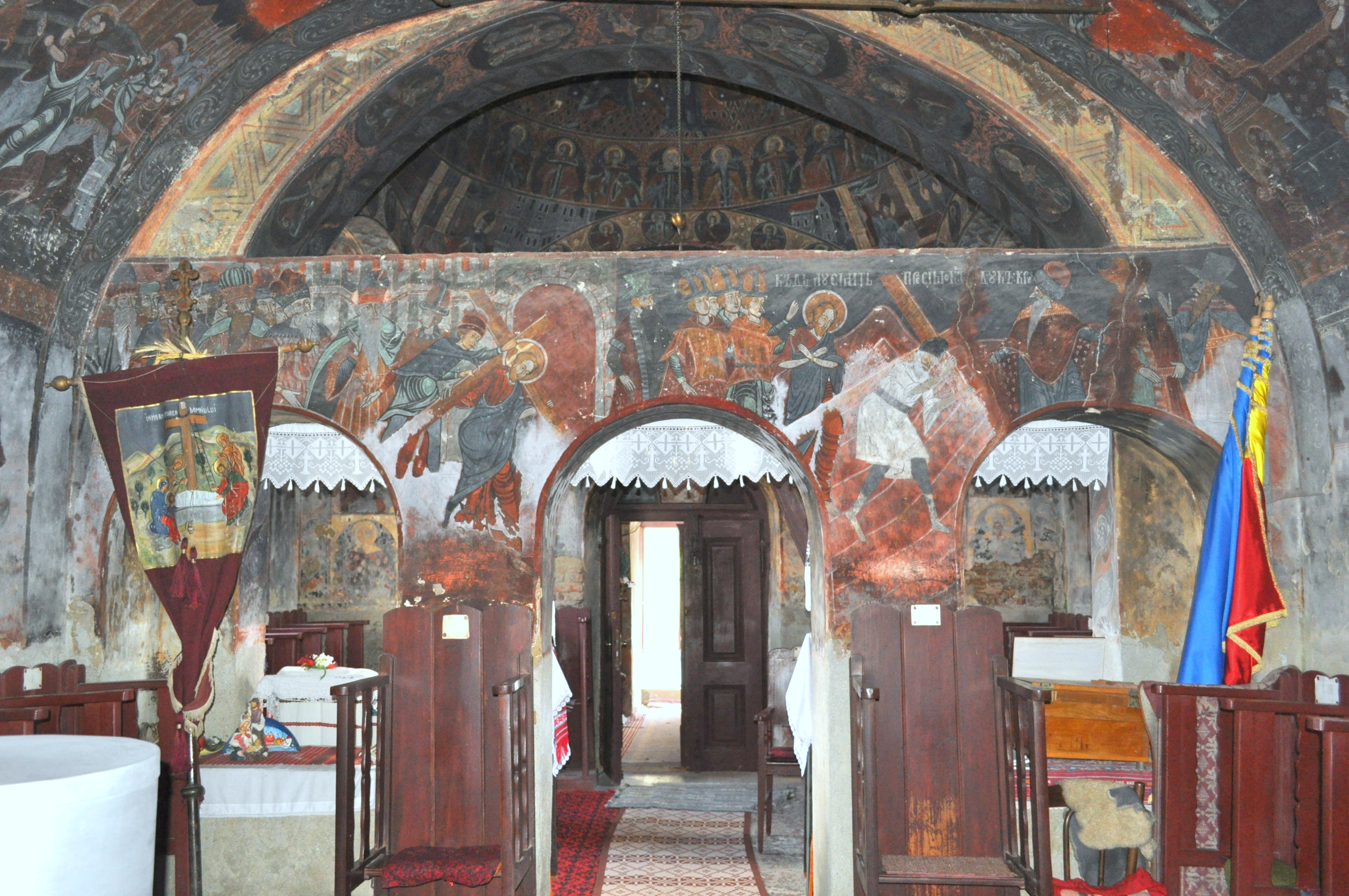 Biserica „Cuvioasa Paraschiva” din Țichindeal, județul Sibiu